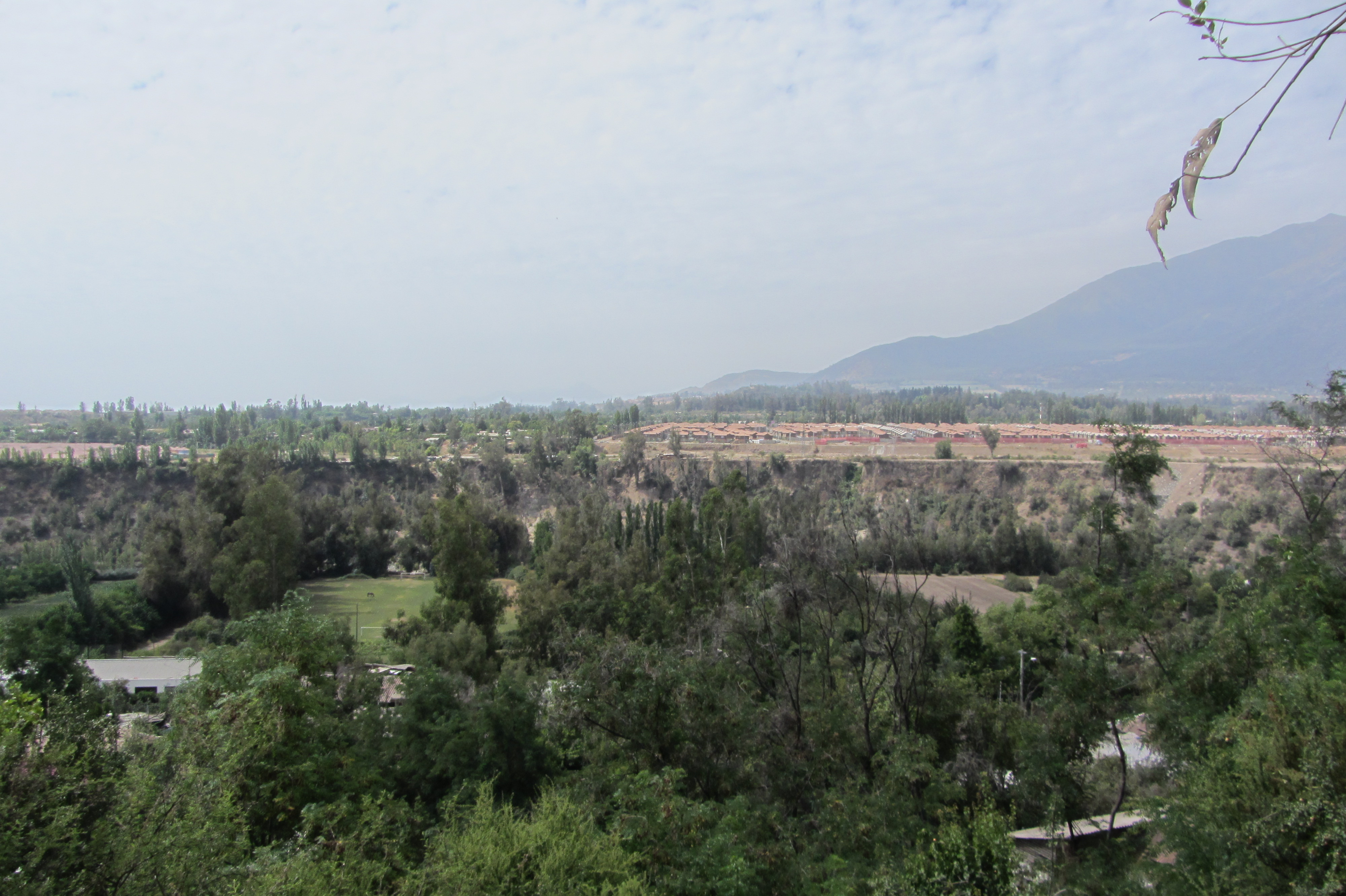 Pirque, Chile